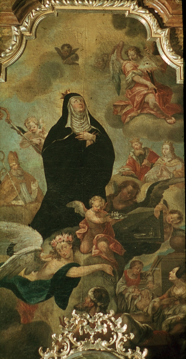 Seitenaltar Aldersbach: Heilige Walburga